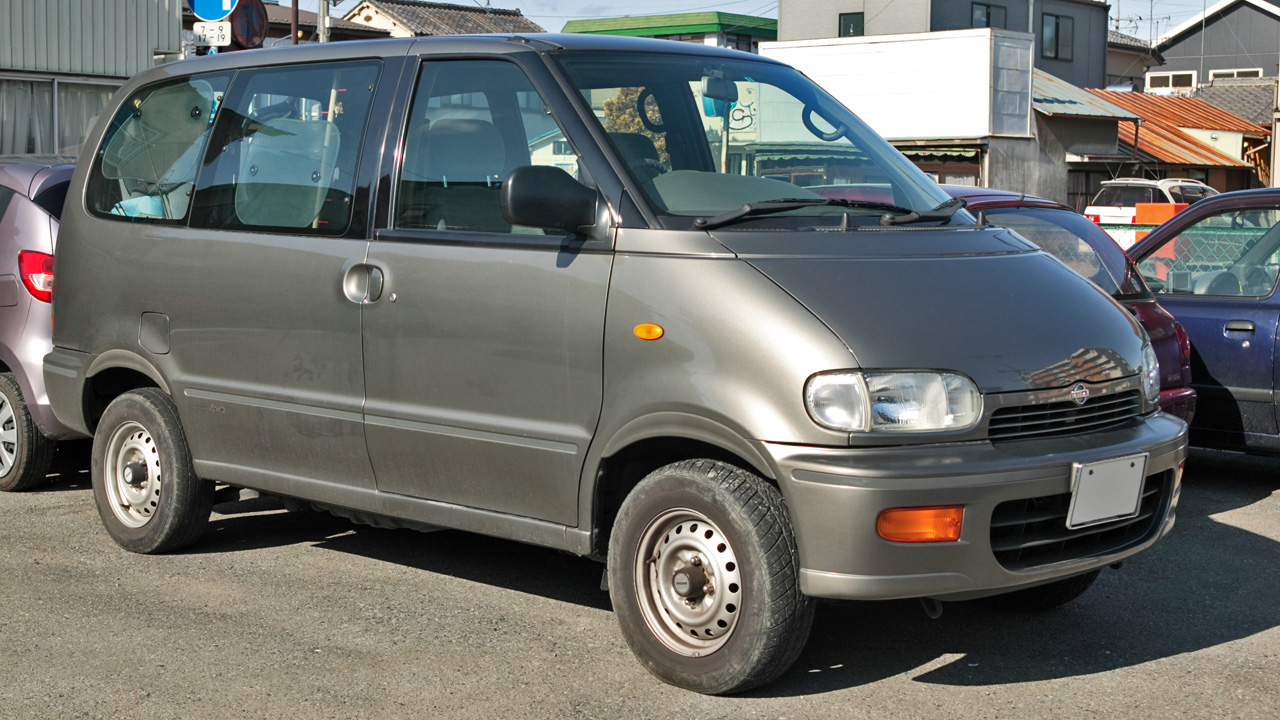 Nissan Serena 2.0 FX Fullauto Fulltime 4WD ( KBNC23 )